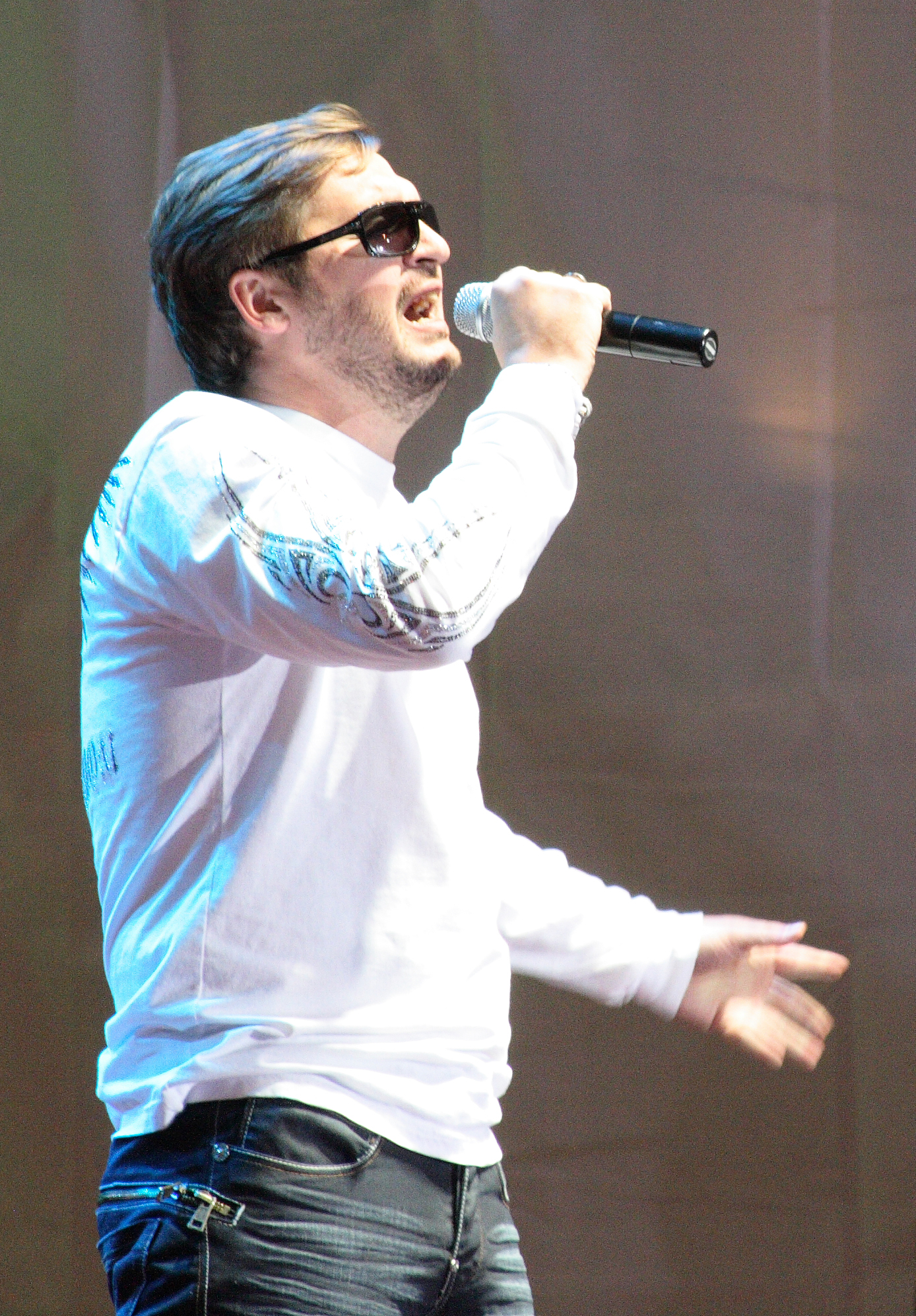 Пономарьов Олександр Валерійович (нар. 9 серпня 1973, Хмельницький) — український естрадний співак, Народний артист України.